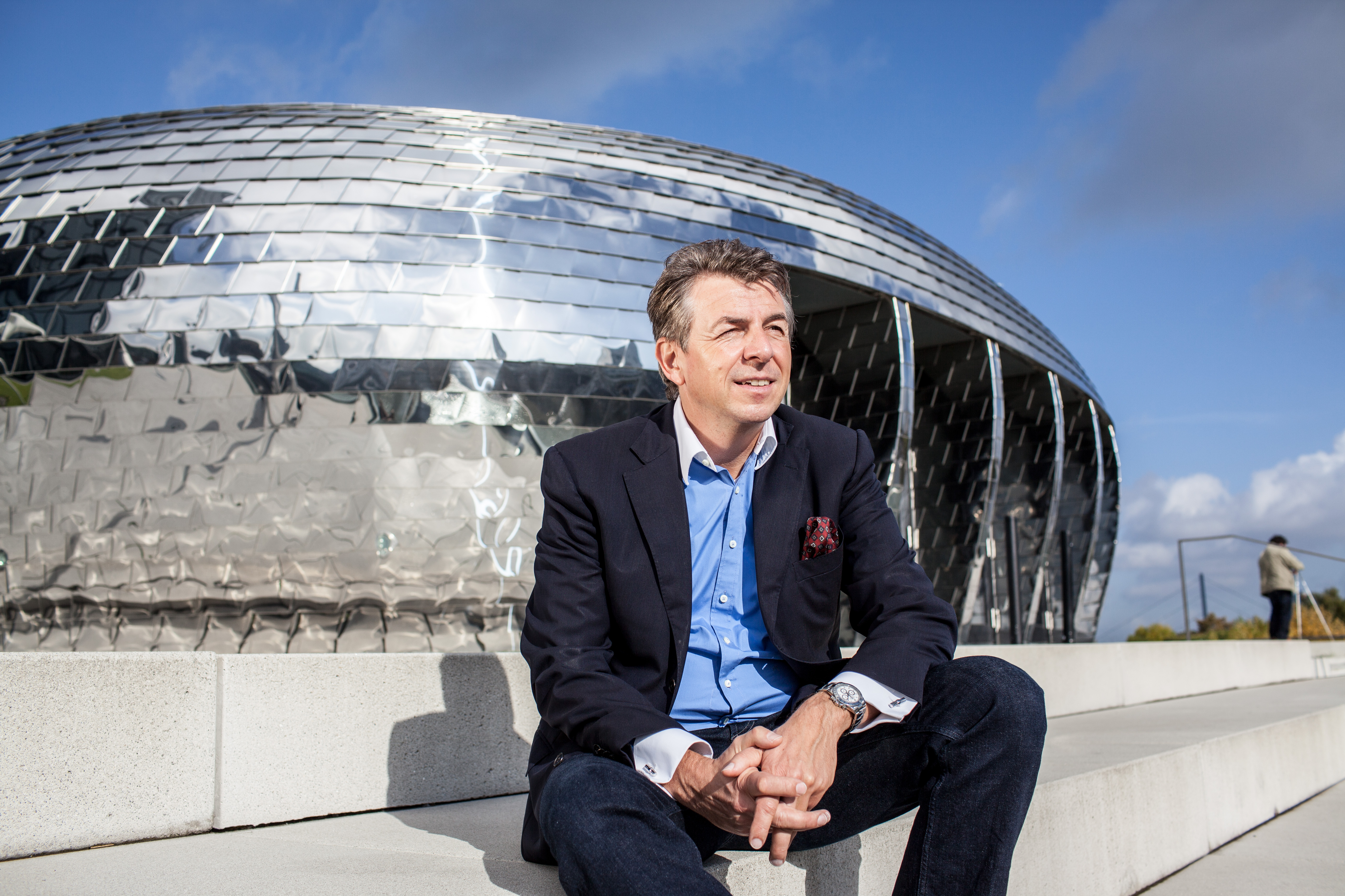 Deitsch: Dirk Schmidt in Düsseldorf am Medienhafen.